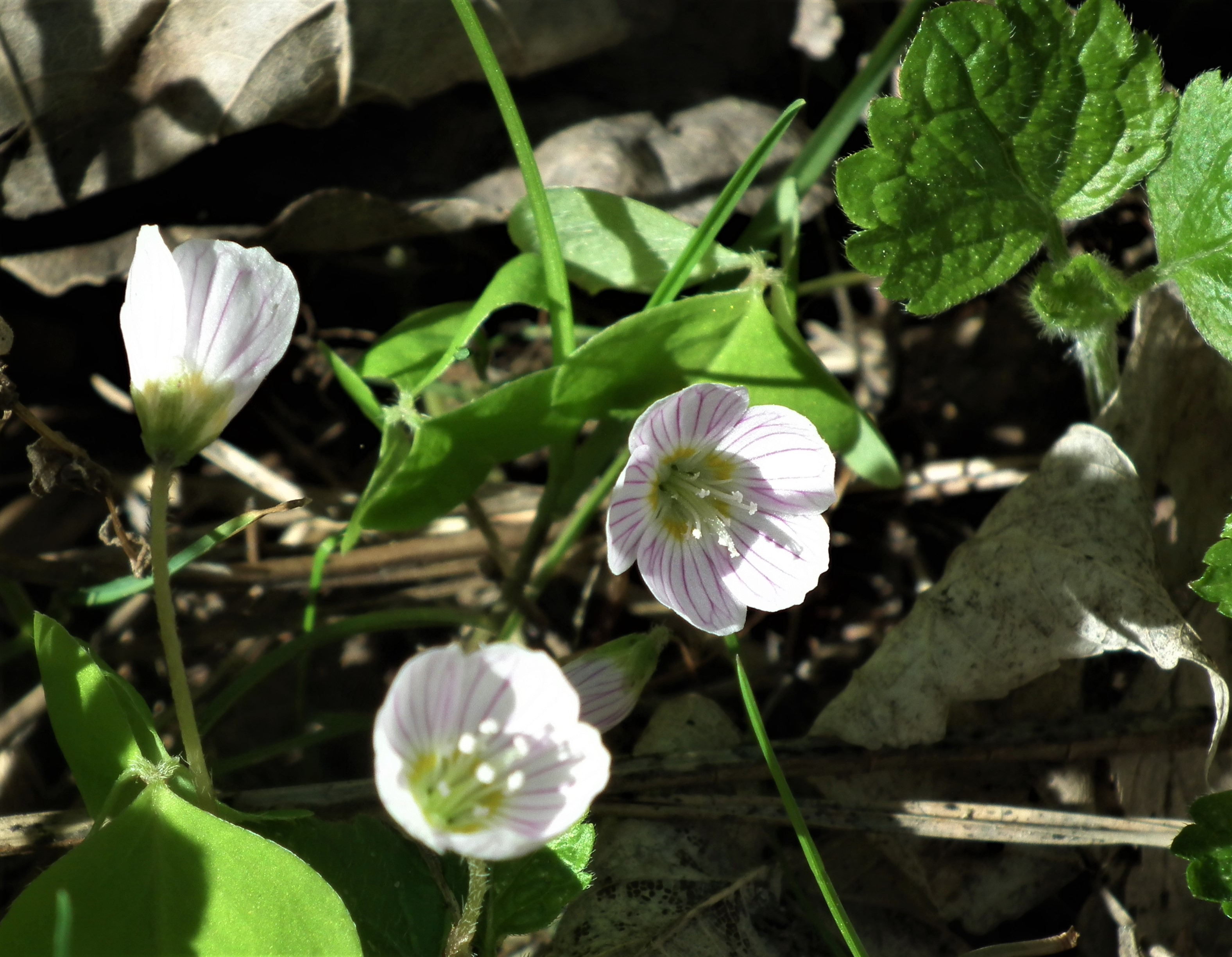 Rezerwat przyr. Bukowa Góra w woj. śląskim., gm. Lipie.